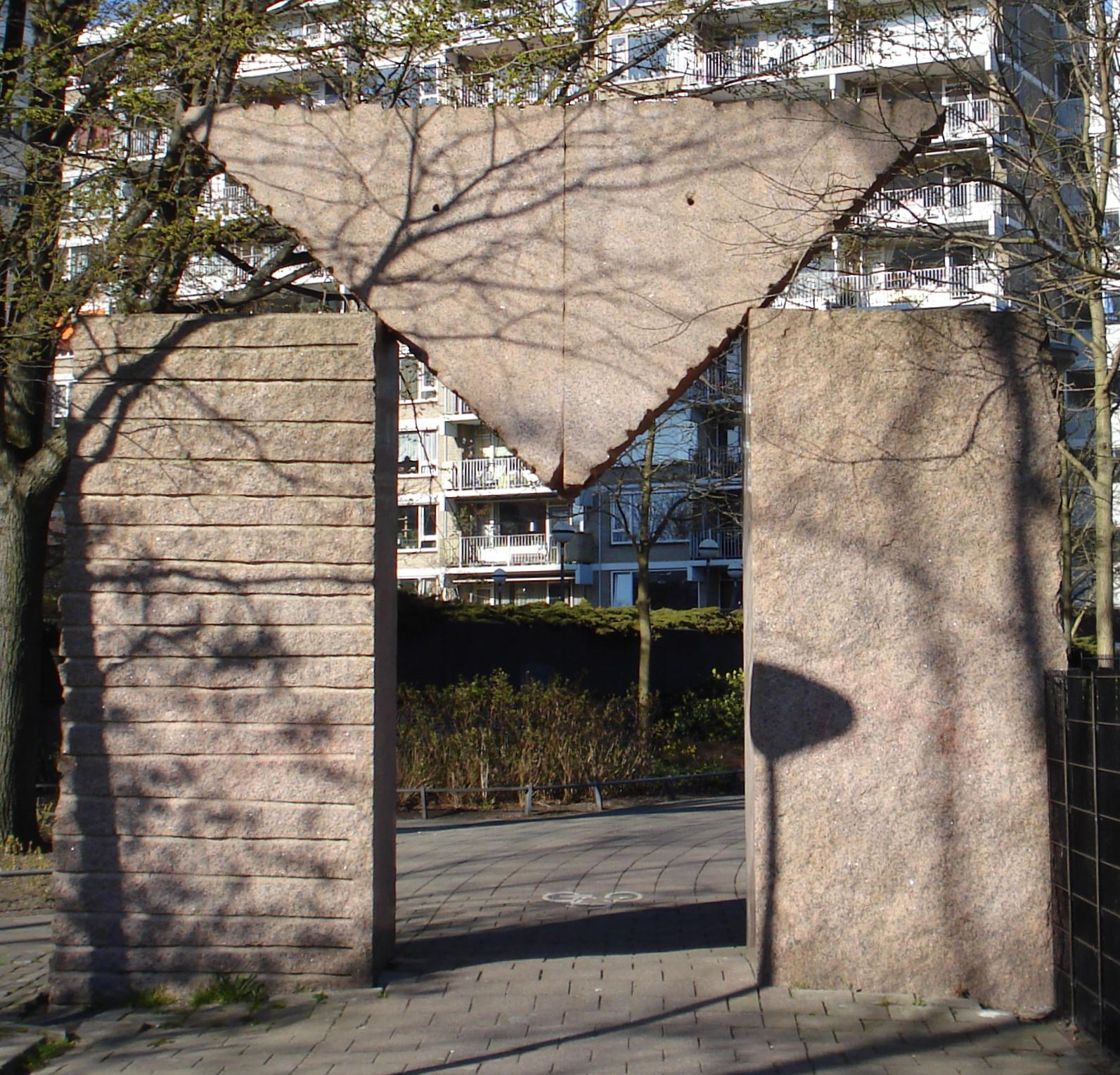 Den Haag, buurtpark Kortenbos. "Poort" van Nout Visser. The Hague/The Netherlands.